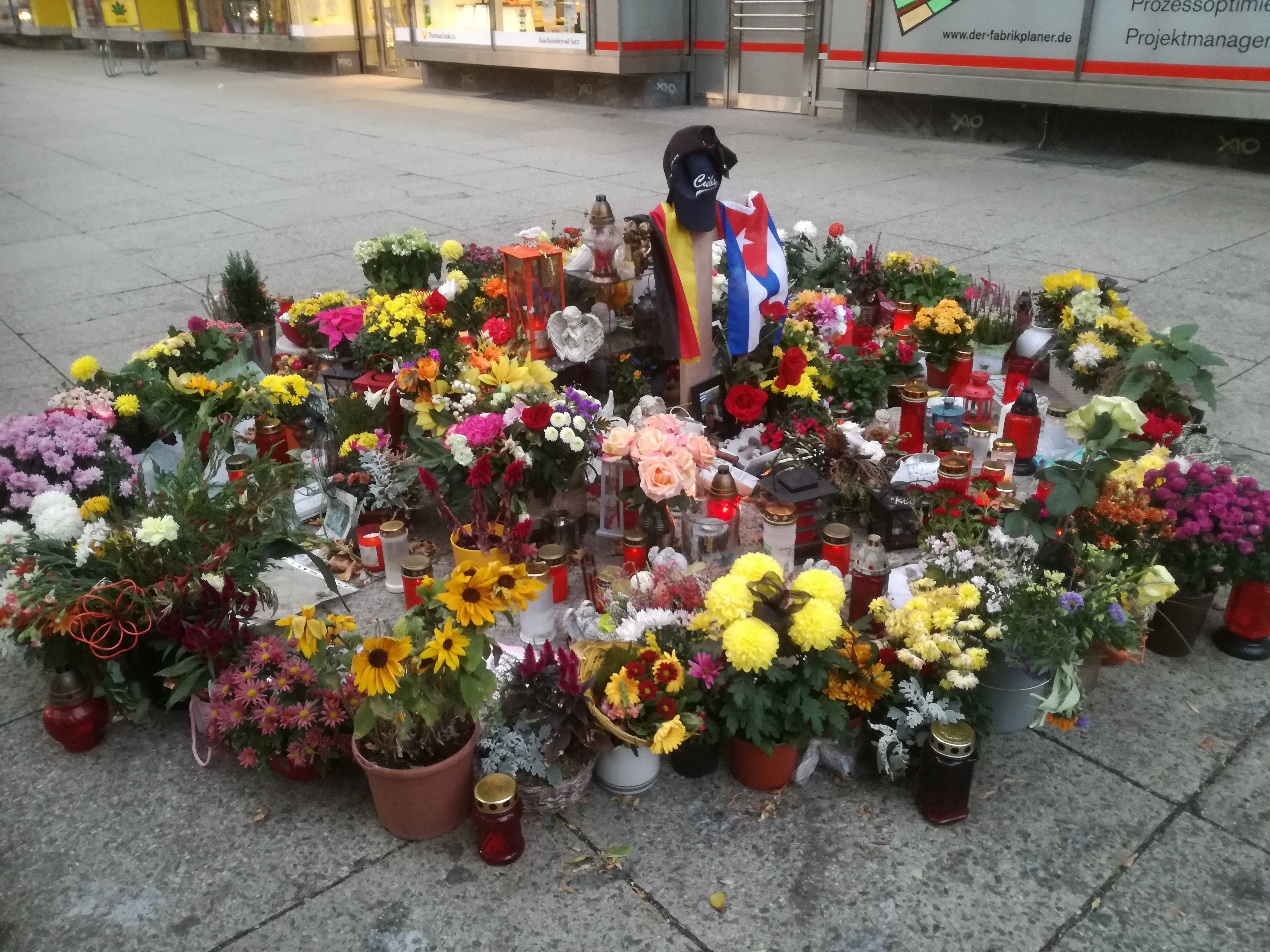 Gedenkort für Daniel H., Innenstadt Chemnitz, 4.10.2018